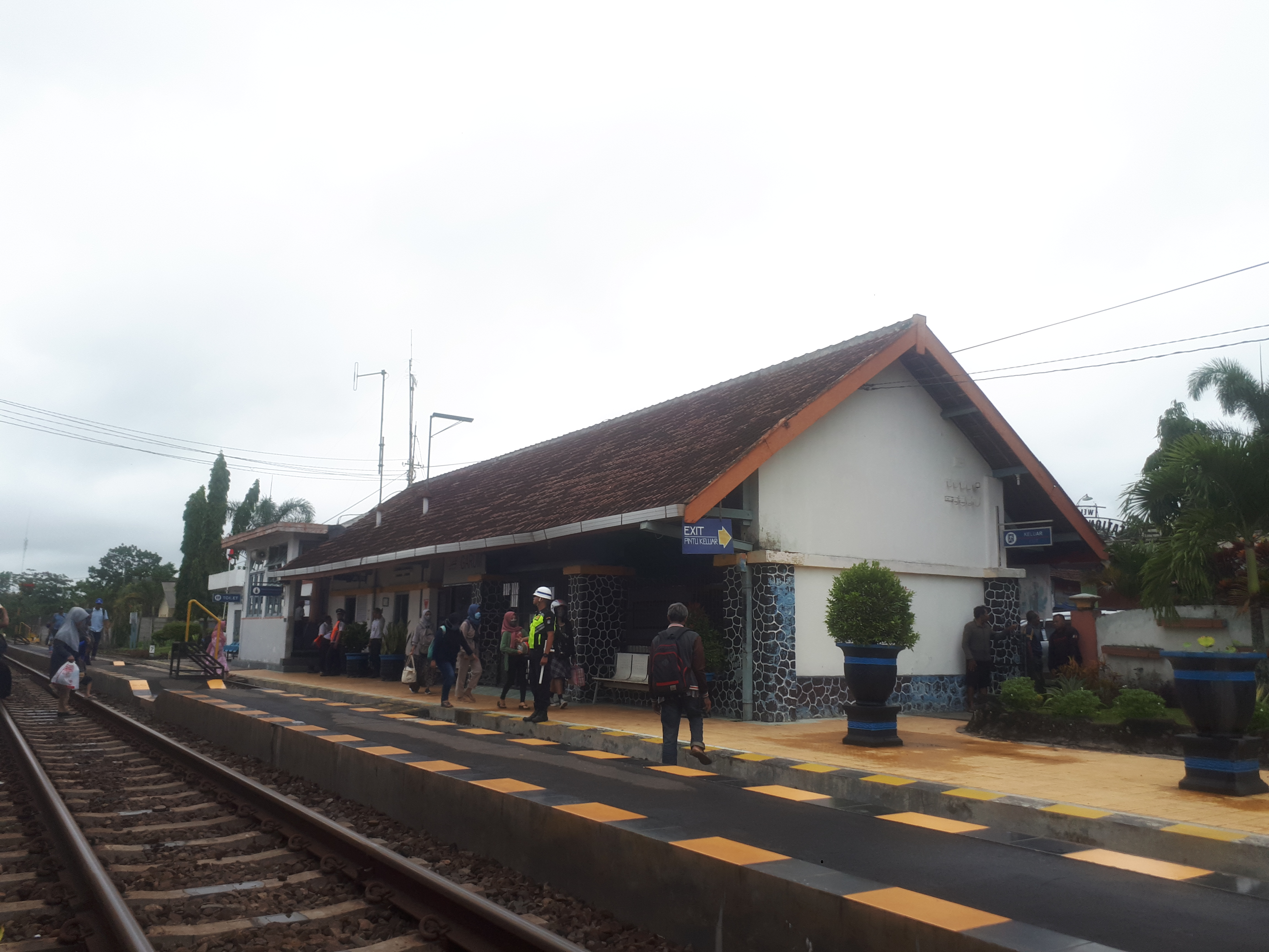 Stasiun Garum pada tahun 2020